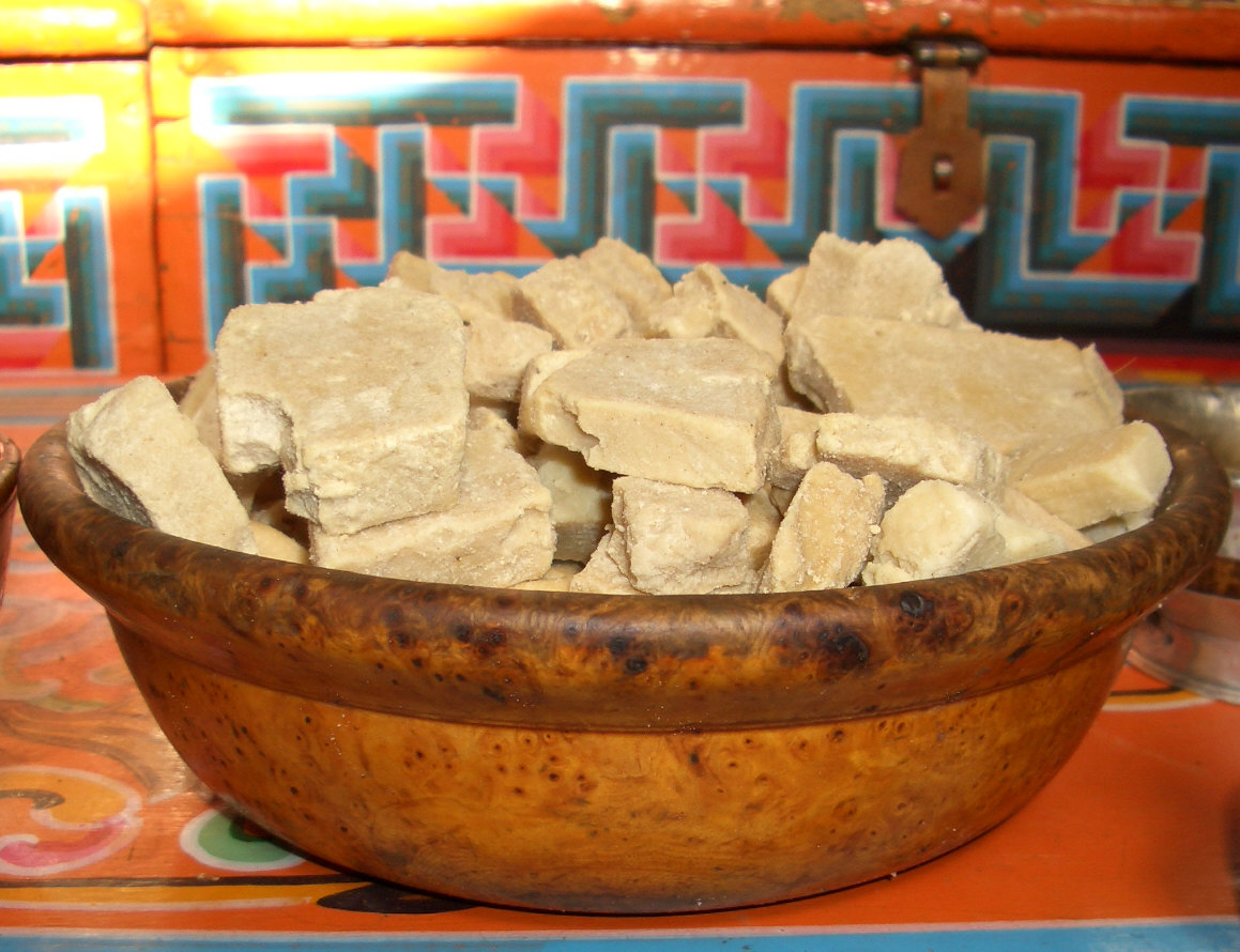 アーロール。